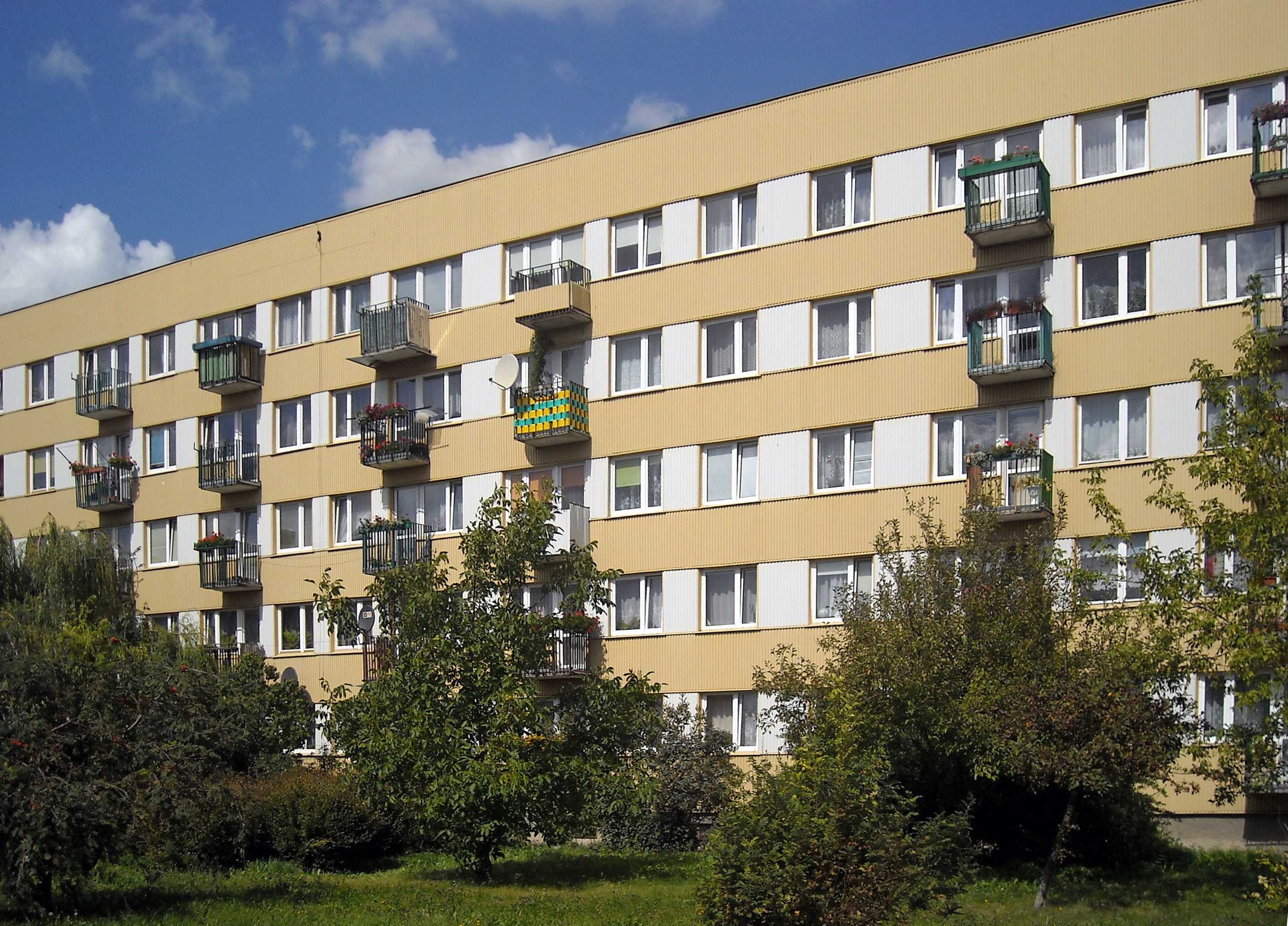 Jeden z najstarszych bloków przy ul. Samsonowicza na Osiedlu Nałkowskich w lubelskiej dzielnicy Wrotków.